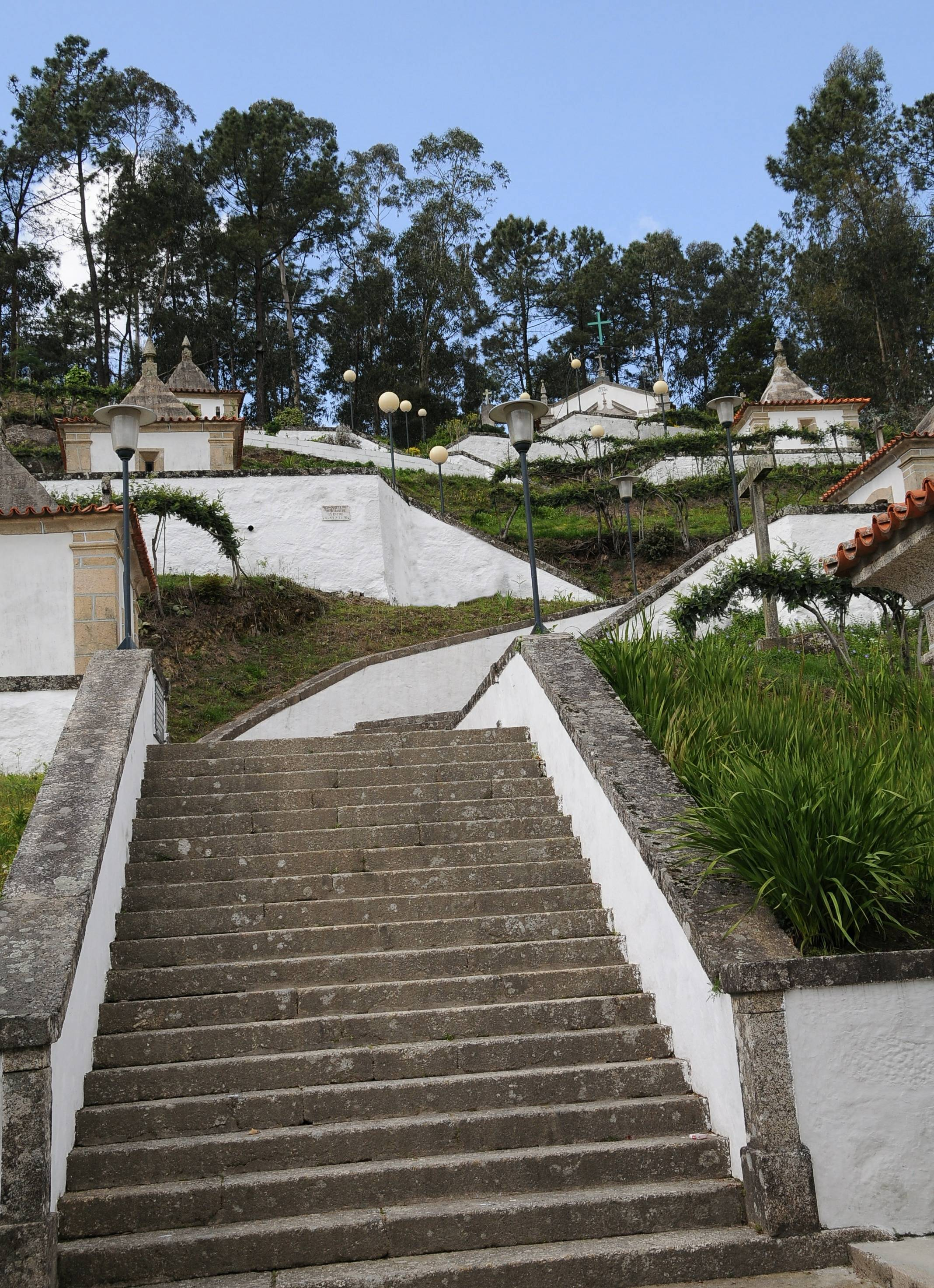 Com Jesus in Cambeses, Barcelos, Portugal